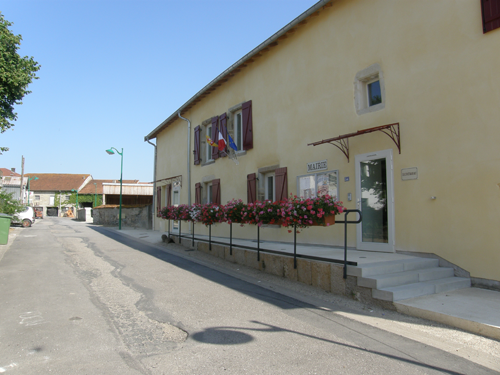 La mairie de Morelmaison